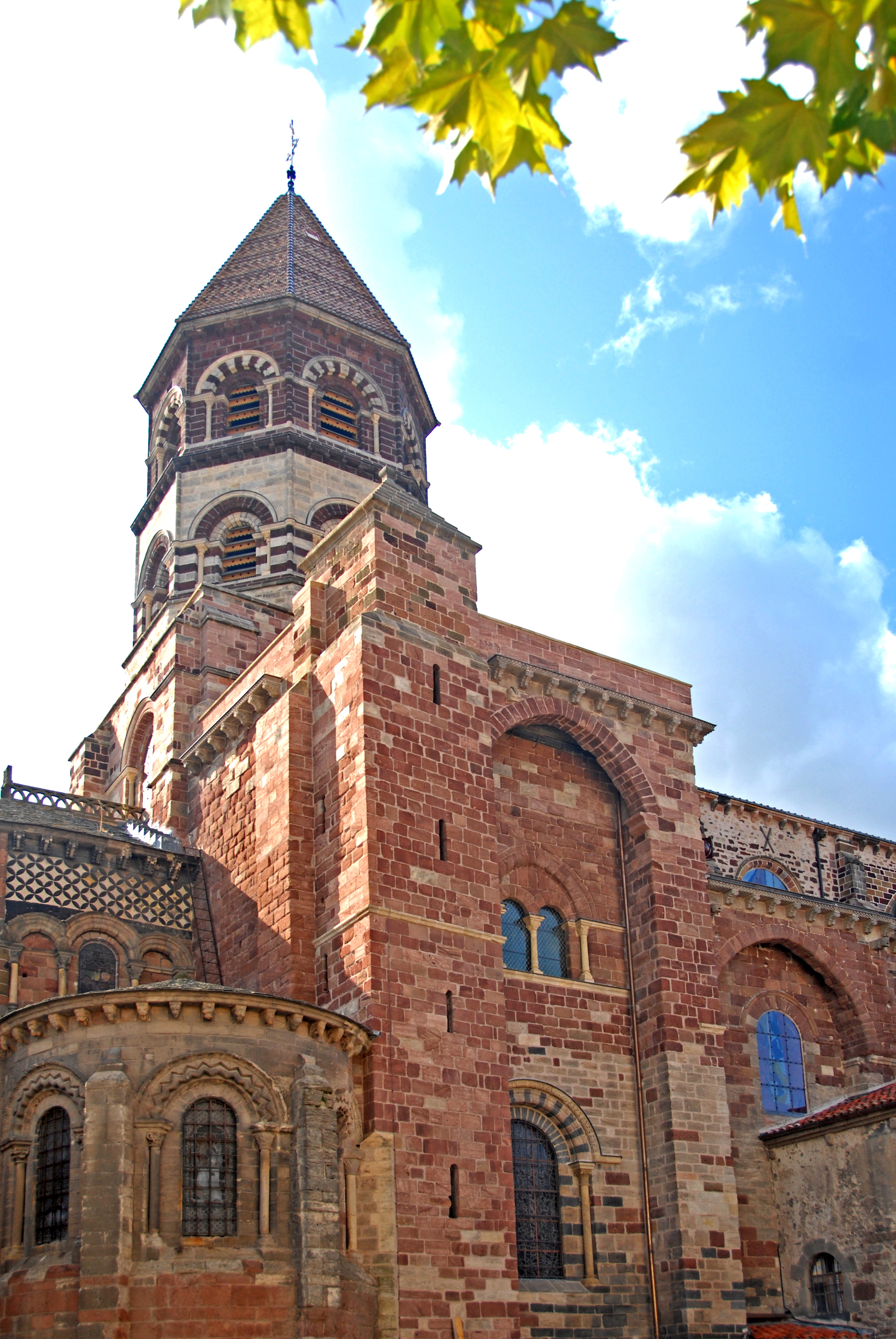 St.-Julien Brioude, Querhaus, Vierungsturm von N